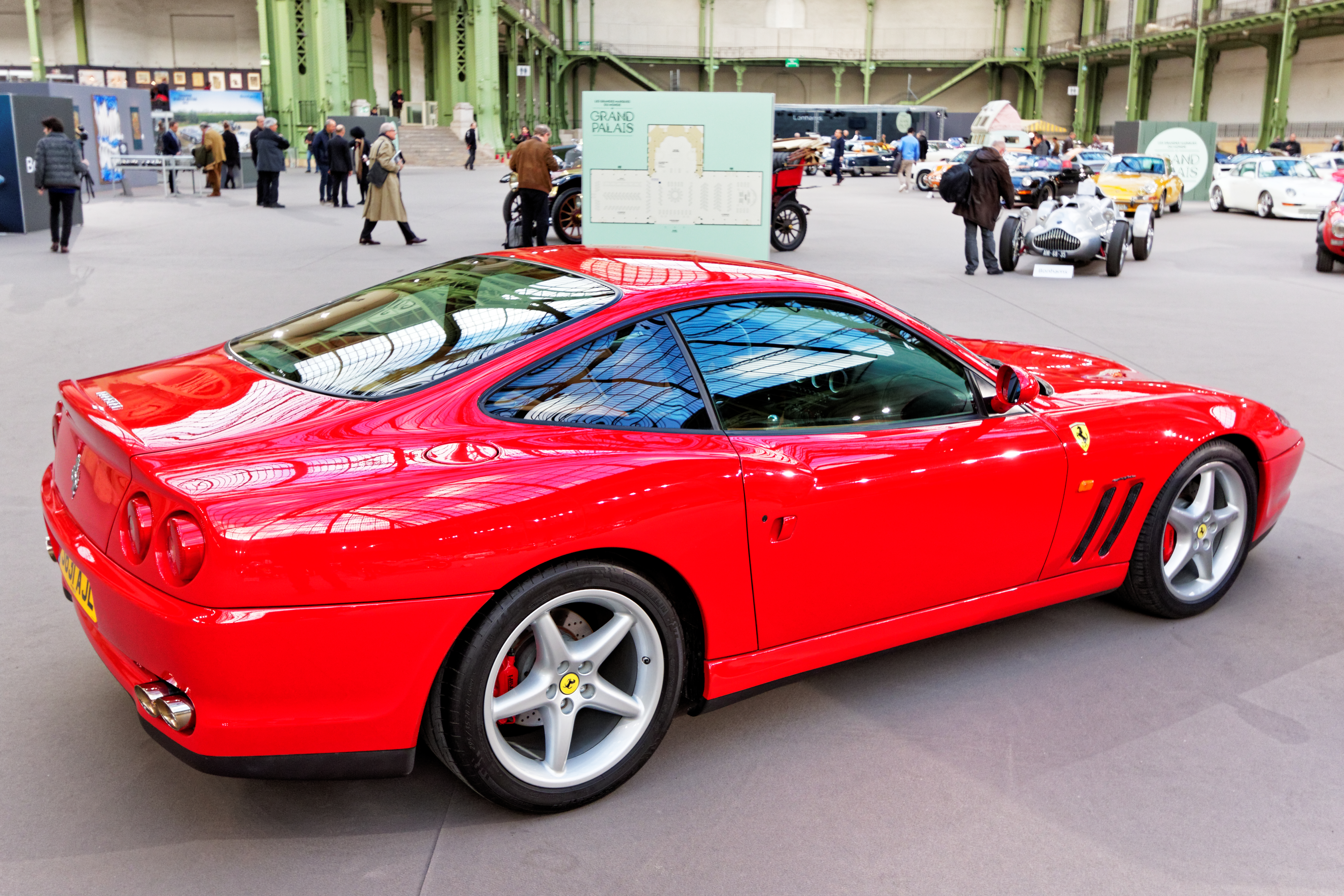 Un des véhicules présenté lors de la vente aux enchères Bonhams 2016 au Grand Palais de Paris.